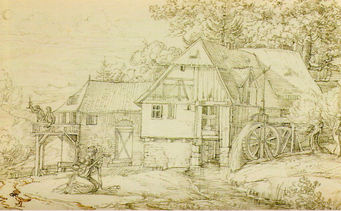 Gerbermühle, Frankfurt am Main